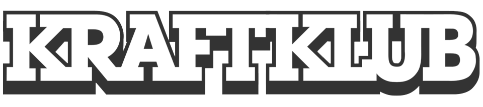 Logo der Band Kraftklub